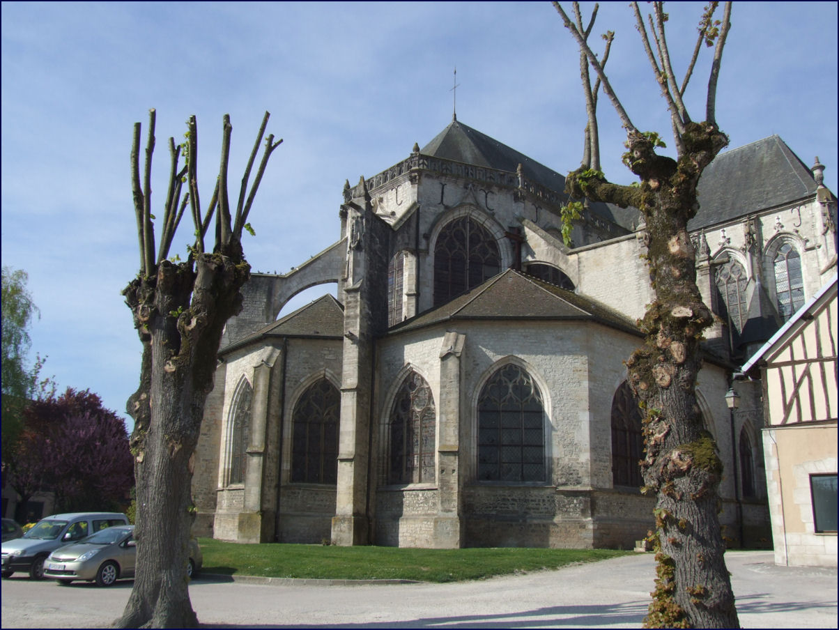 l'église St-Étienne (St. Stephen), Bar-sur-Seine, France